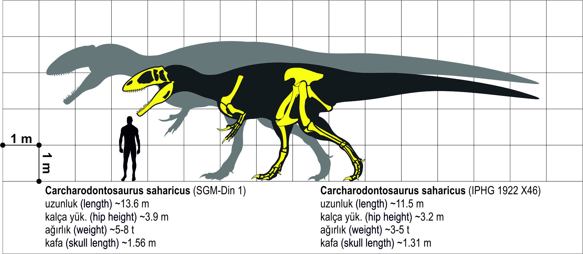 Carcharodontosaurus saharicus ve insan